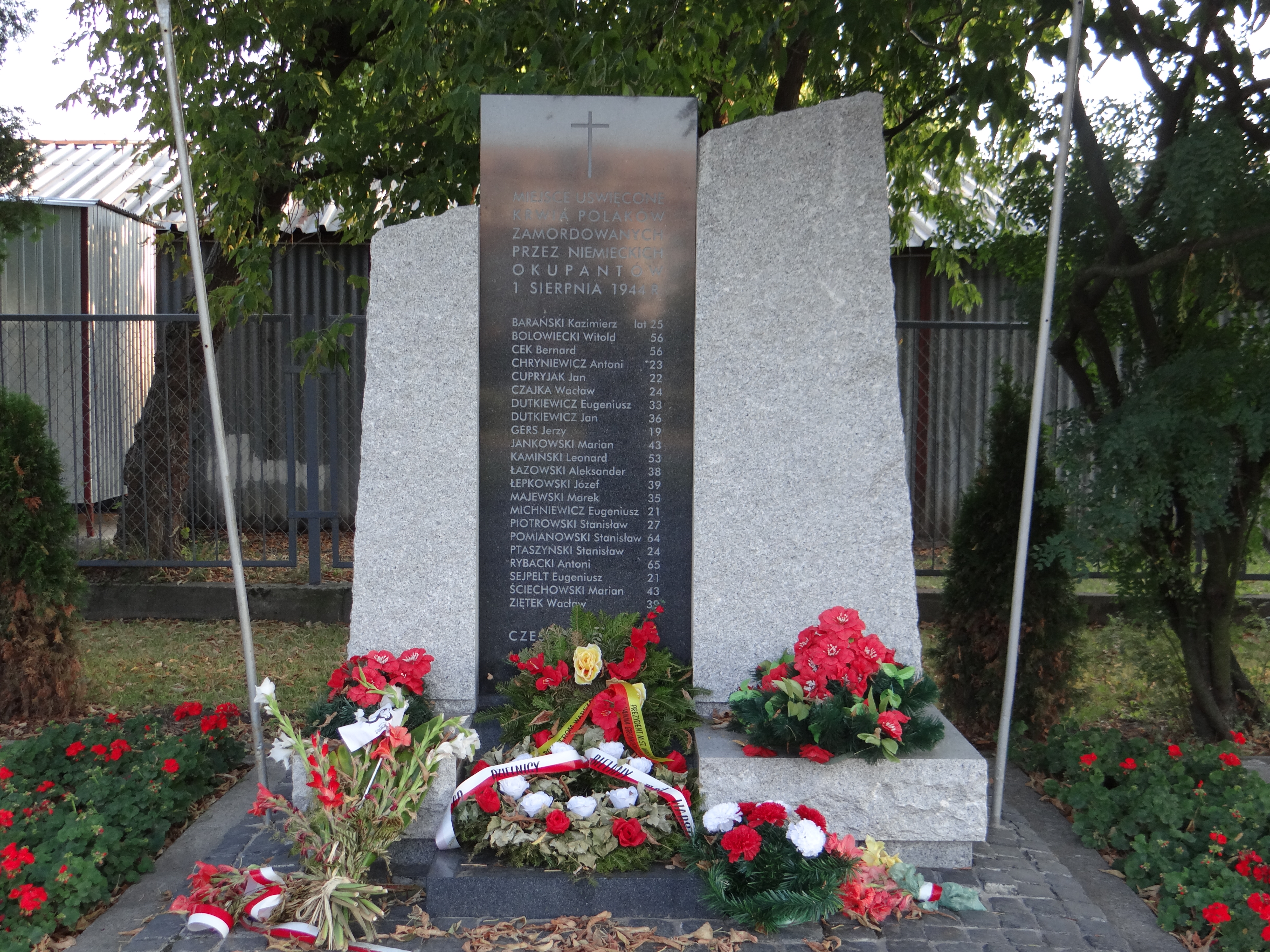 Tablica memoriałowa informuje o miejscu dokonania przez niemieckich oprawców mordu na Polakach w pierwszym dniu Powstania Warszawskiego.